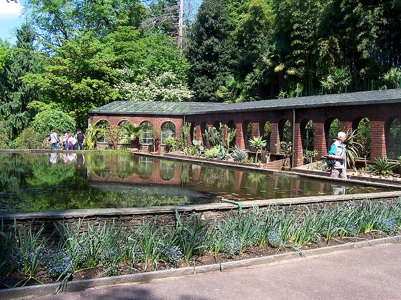 Verbania - Giardino d'inverno di Villa Taranto